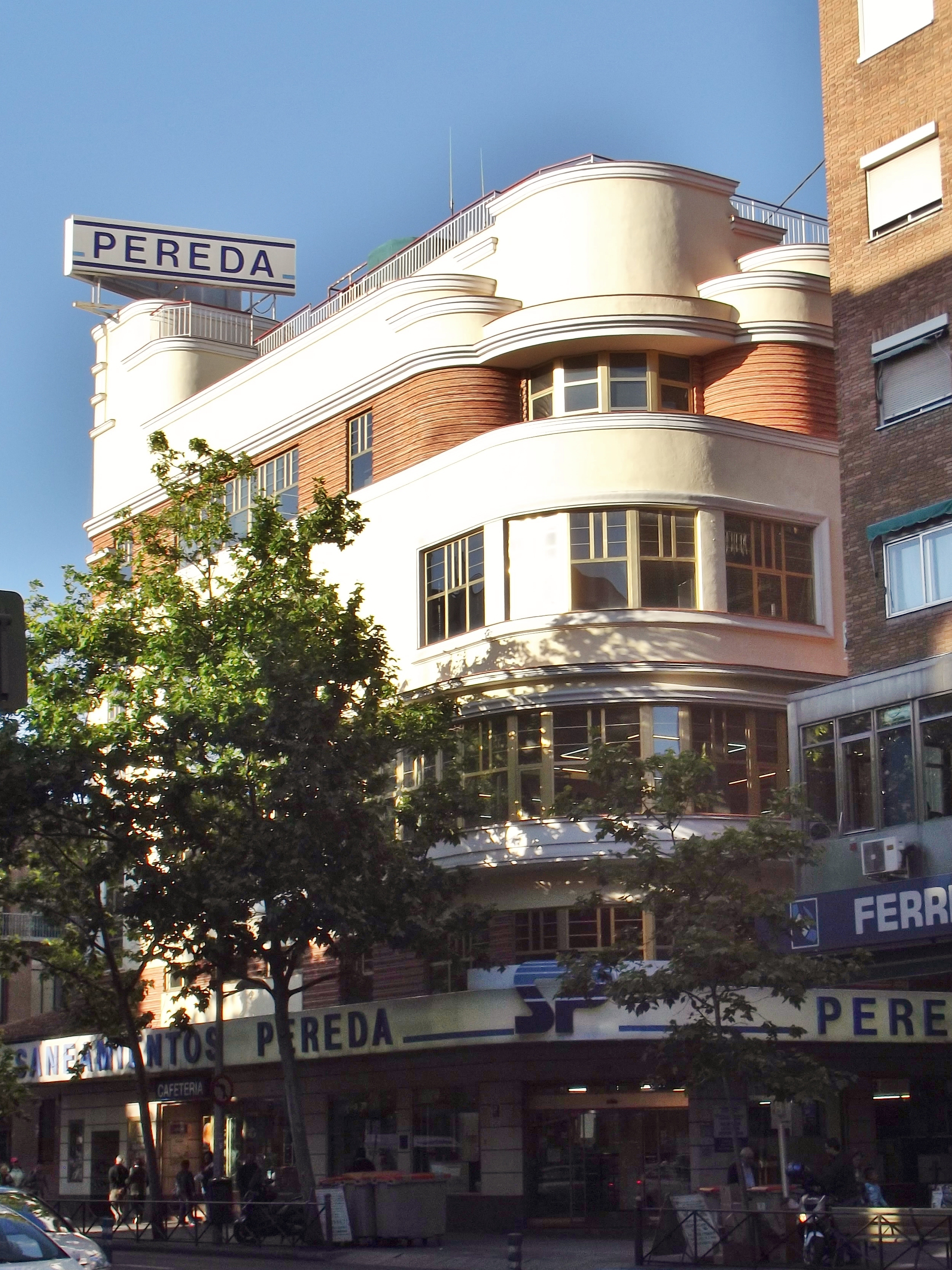 Edificio de Saneamientos Pereda (antiguo Cine Europa), calle de Bravo Murillo 160, Madrid.